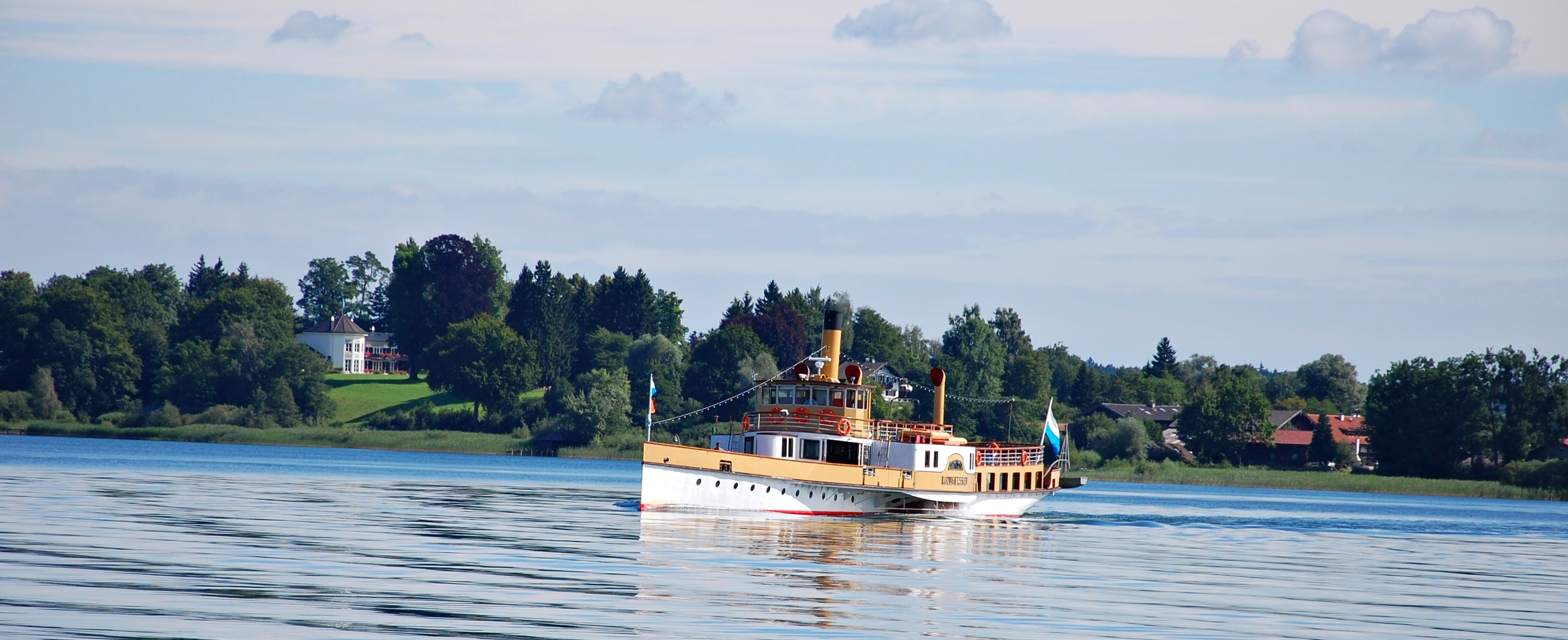 Ludwig Fessler leicht von vorne bei voller Fahrt